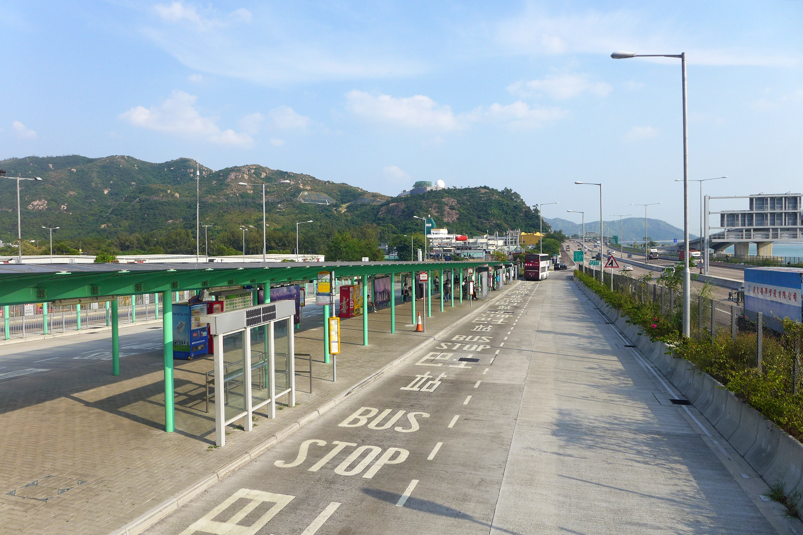 Tuen Mun Road Bus Interchange